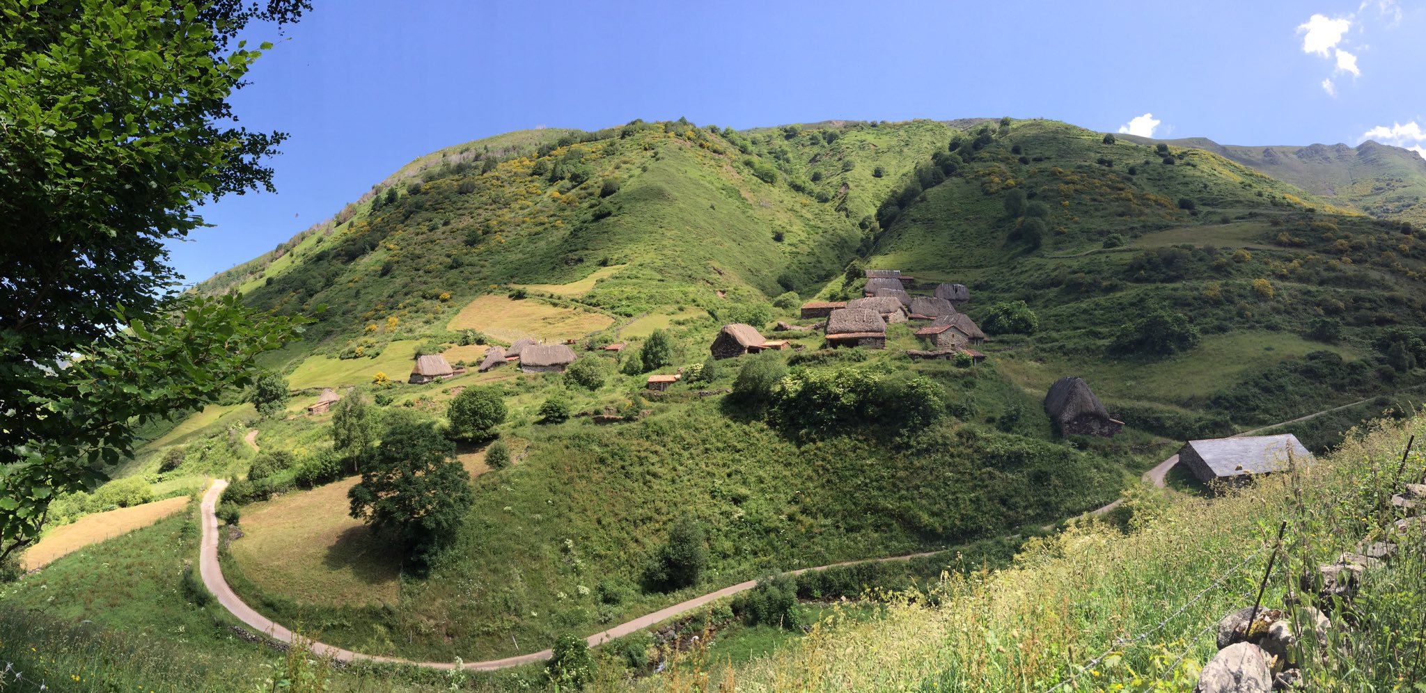 Braña La Pornacal, Somiedu.